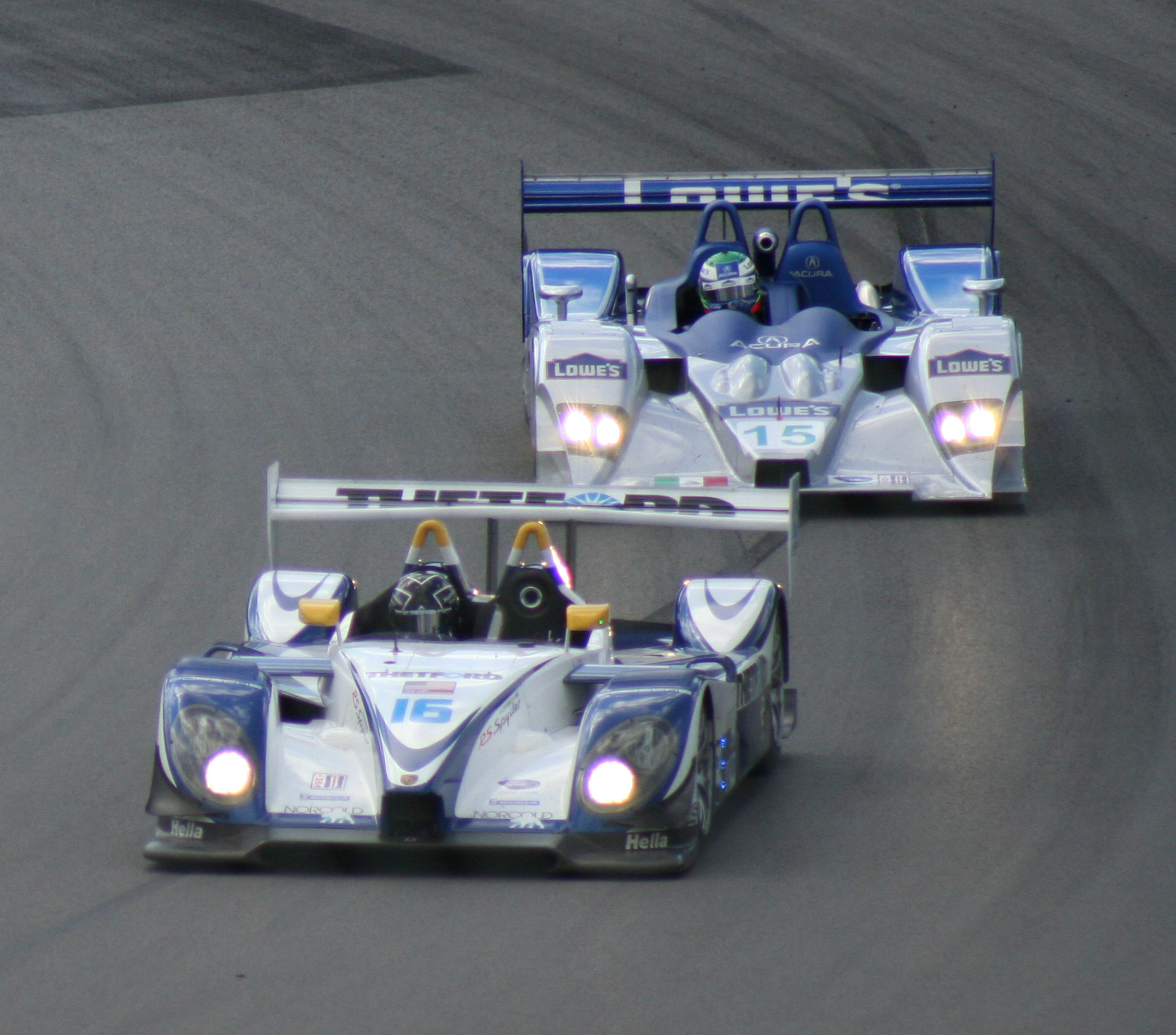 Dyson's Porsche RS Spyder leading Fernandez's Lola B06/43-Acura